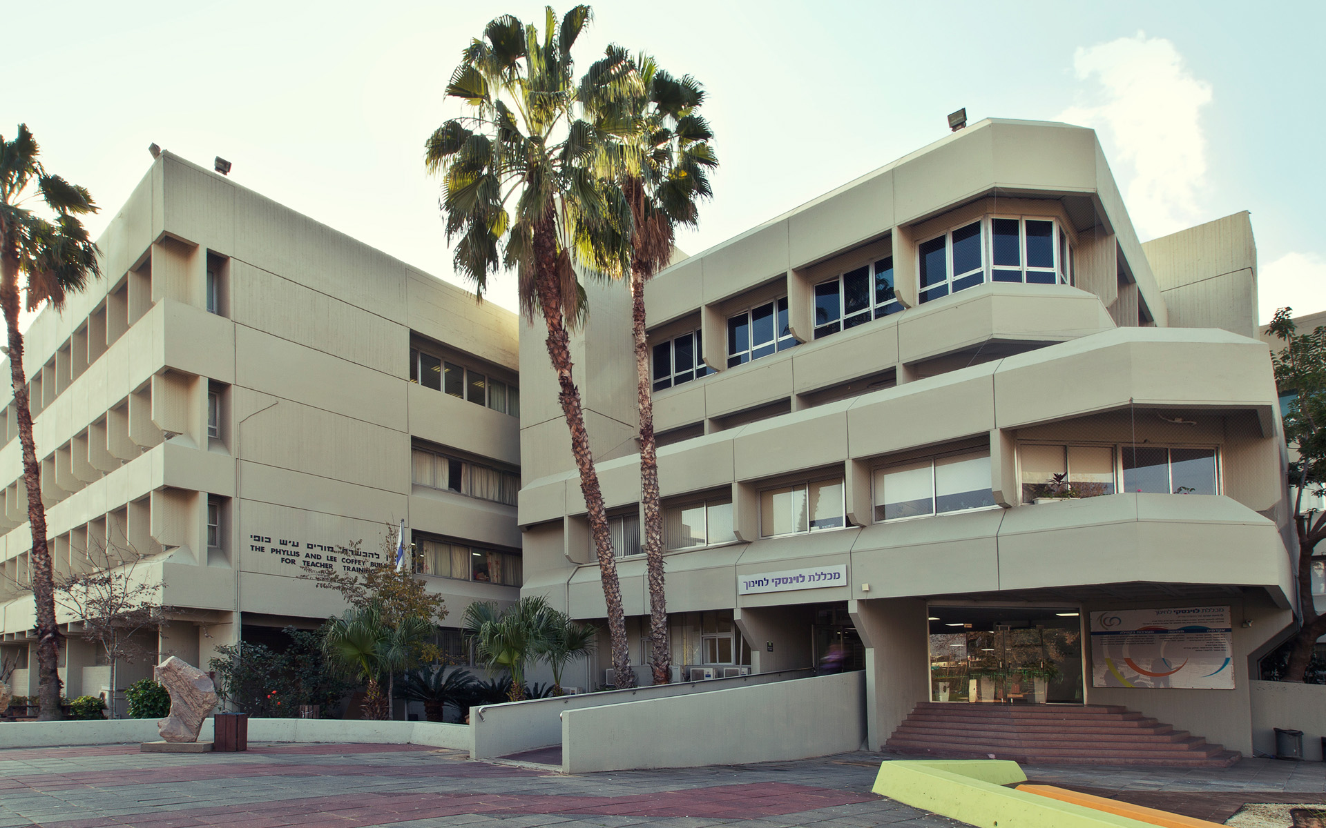 מכללת לוינסקי - מראה מבחוץ. צילום: ערן כהן